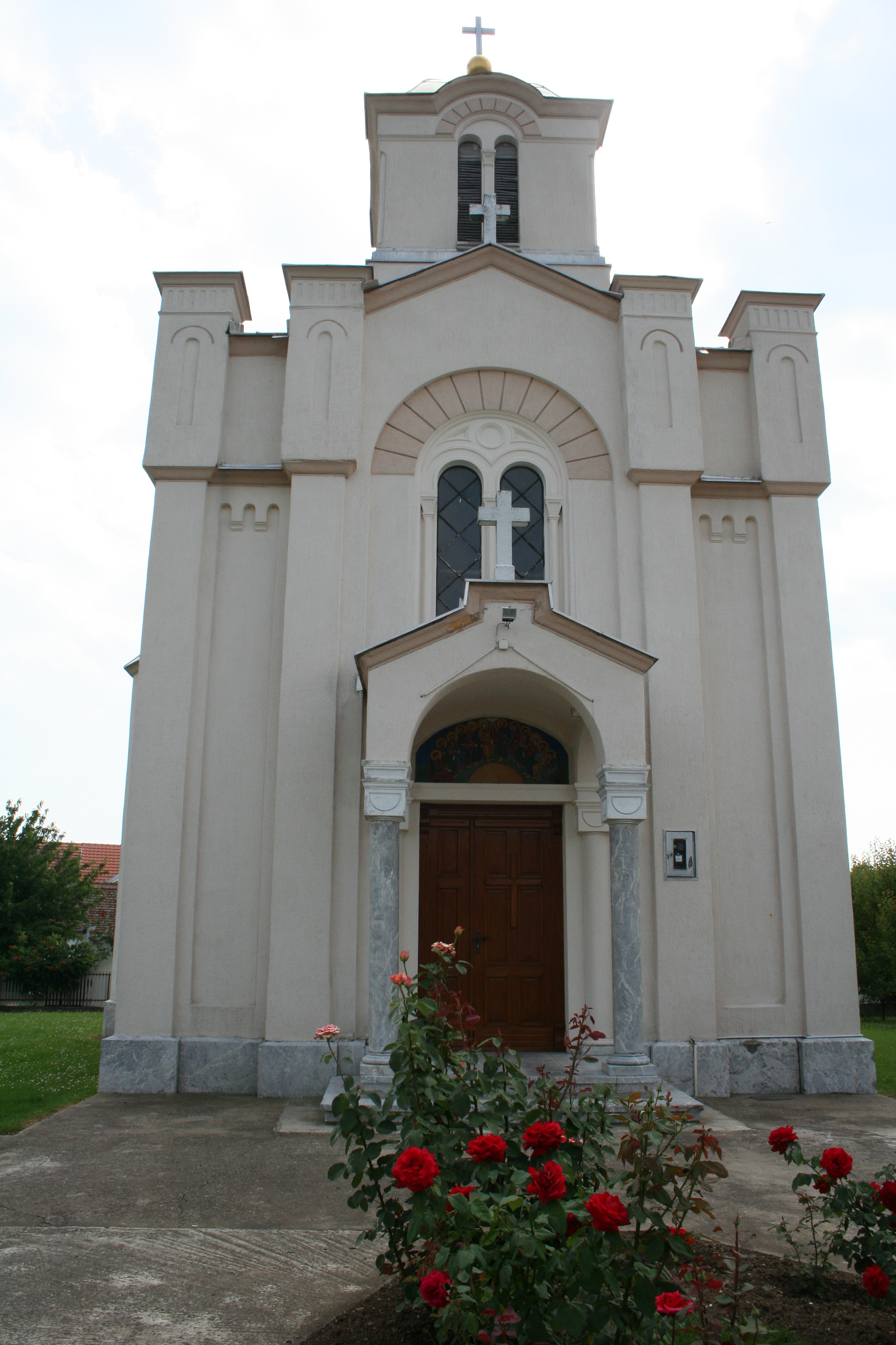 Crkva Svete Trojice u Zasavici II